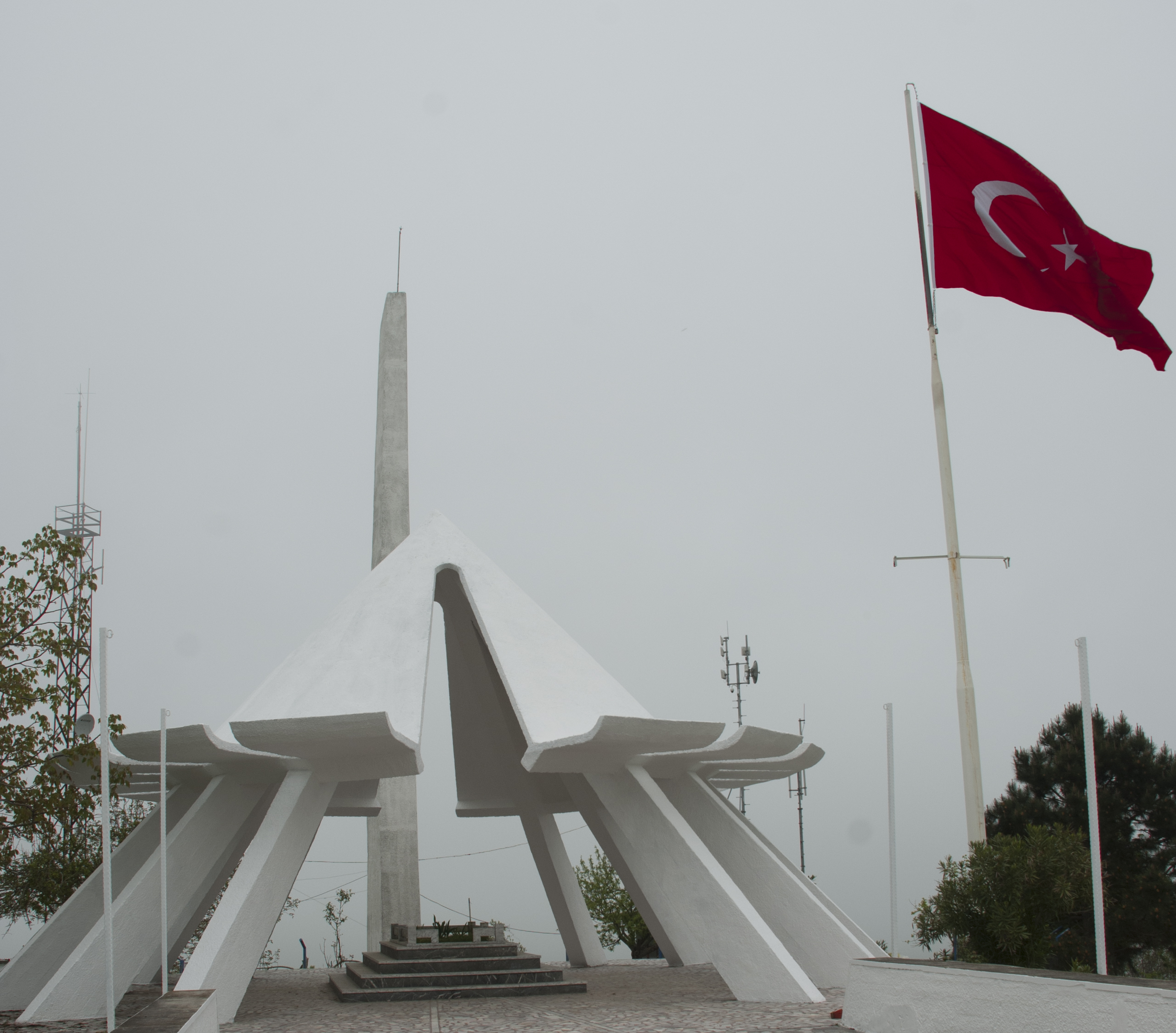 Kandıra Babaköy'de bulunan Akça Koca'nın türbesi.